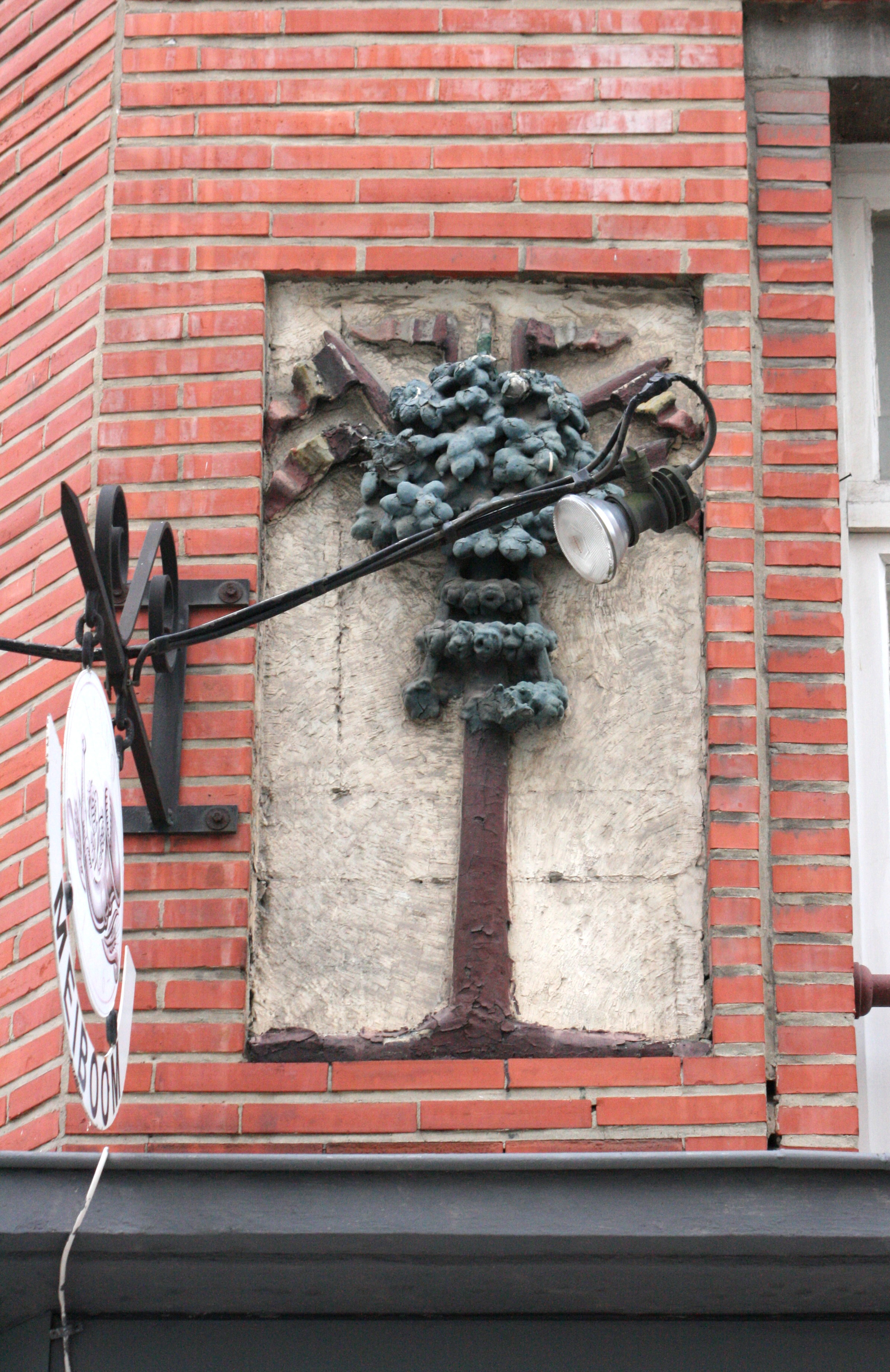 Zandstraat 39, Brussel (België), hoek met de Sint-Laurensstraat. Café "Le Meiboom". Steen op de gevel die herinnert aan de jaarlijkse planting van de Meiboom